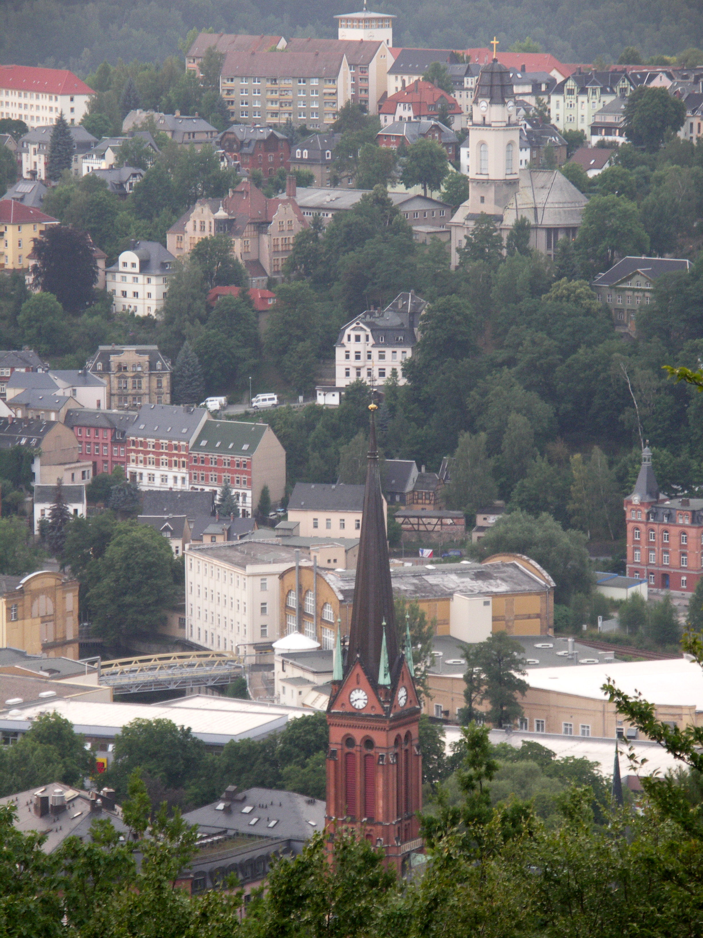 Aue, Blick auf den Stadtteil "Zeller Berg"